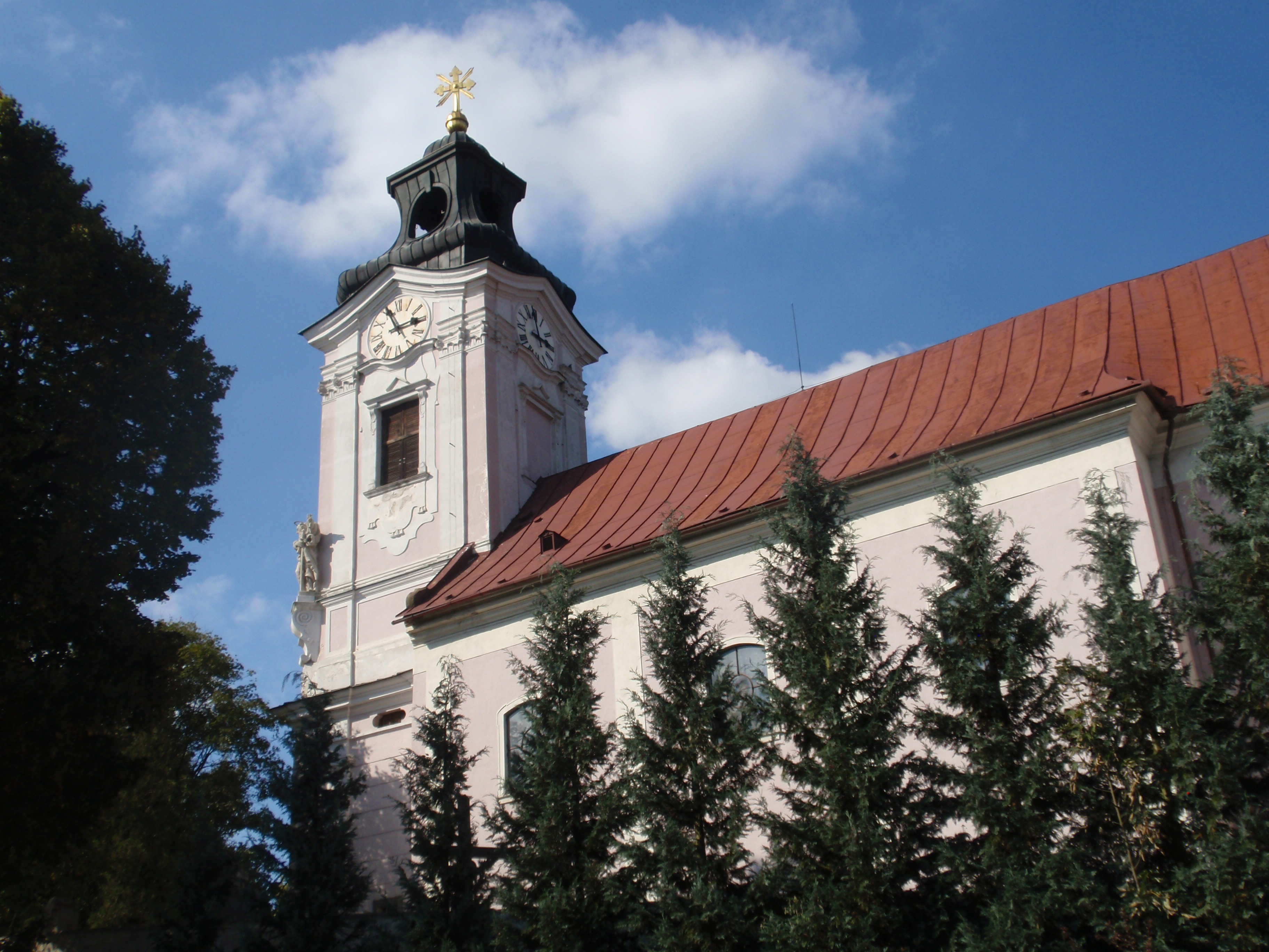 Kostel sv. Petra a Pavla (Tasov), v západní části obce, Tasov